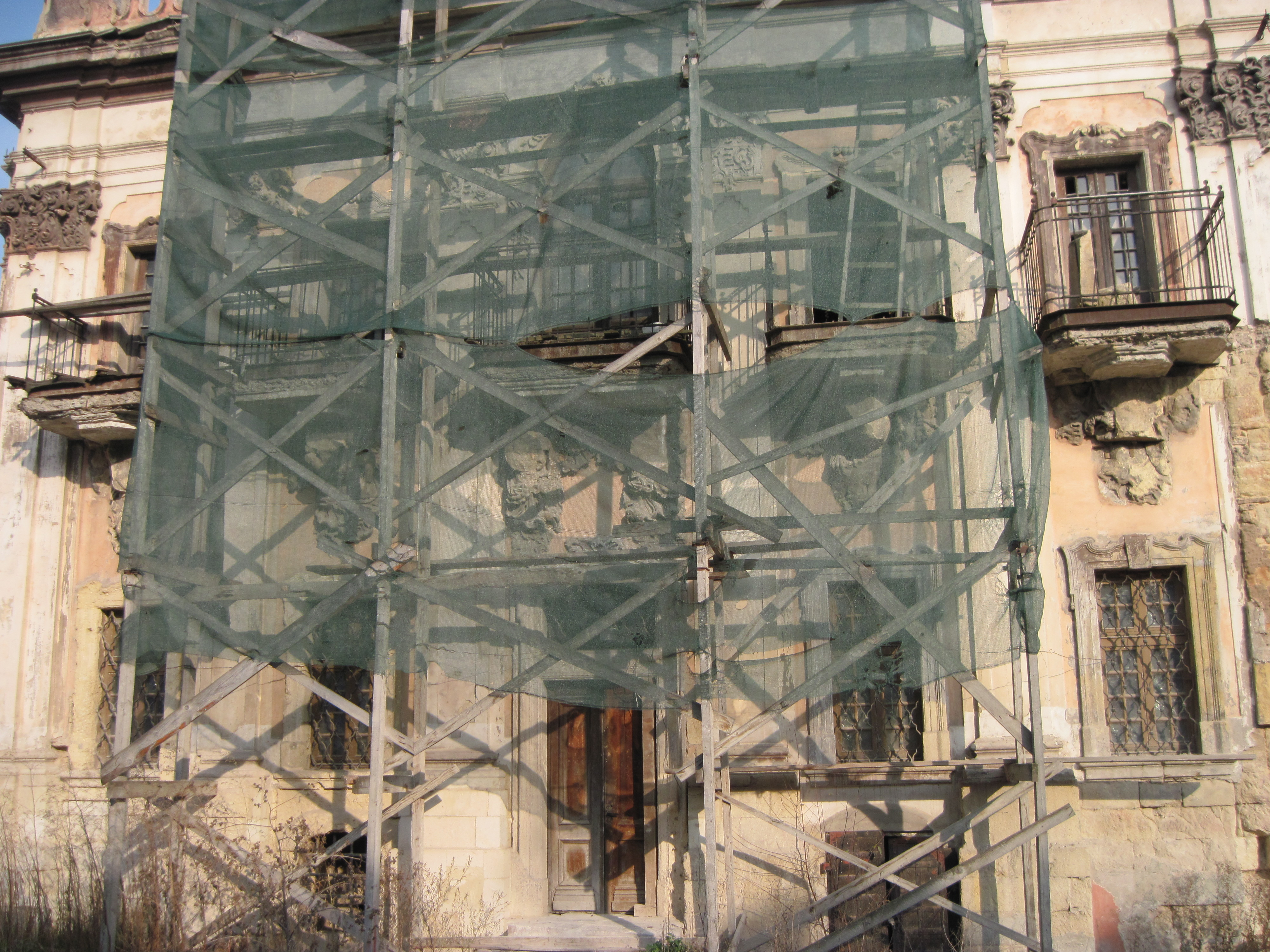 Бучацька ратуша. Ремонт